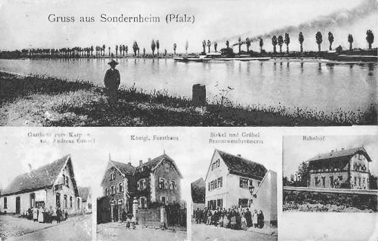 Postkarte mit Ansichten von Sondernheim aus dem Jahr 1910